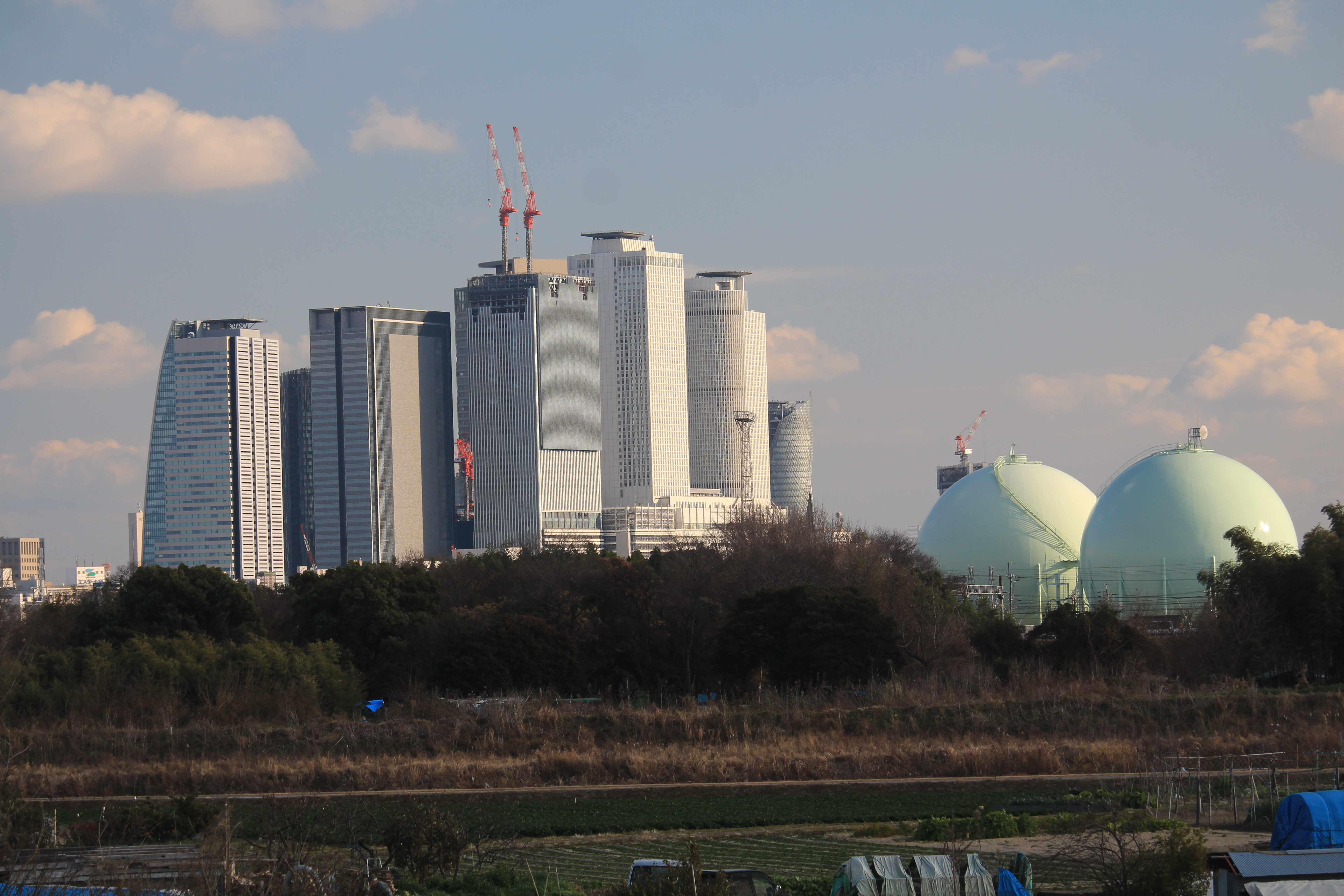 西側の庄内川右岸から望む名駅の超高層ビル群（左から名古屋ルーセントタワー、大名古屋ビルヂング、JPタワー名古屋、建設中のJRゲートタワー、ミッドランドスクエア、JRセントラルタワーズ、モード学園スパイラルタワーズ）と東邦ガスの日比津基地のガスタンク